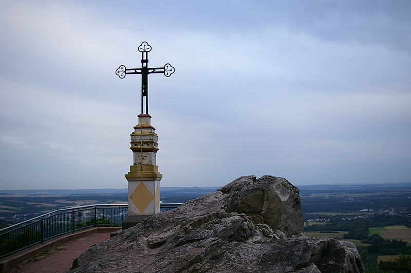 Litermontkreuz; Margaretenkreuz